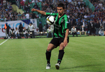 Hamza Kocaeli